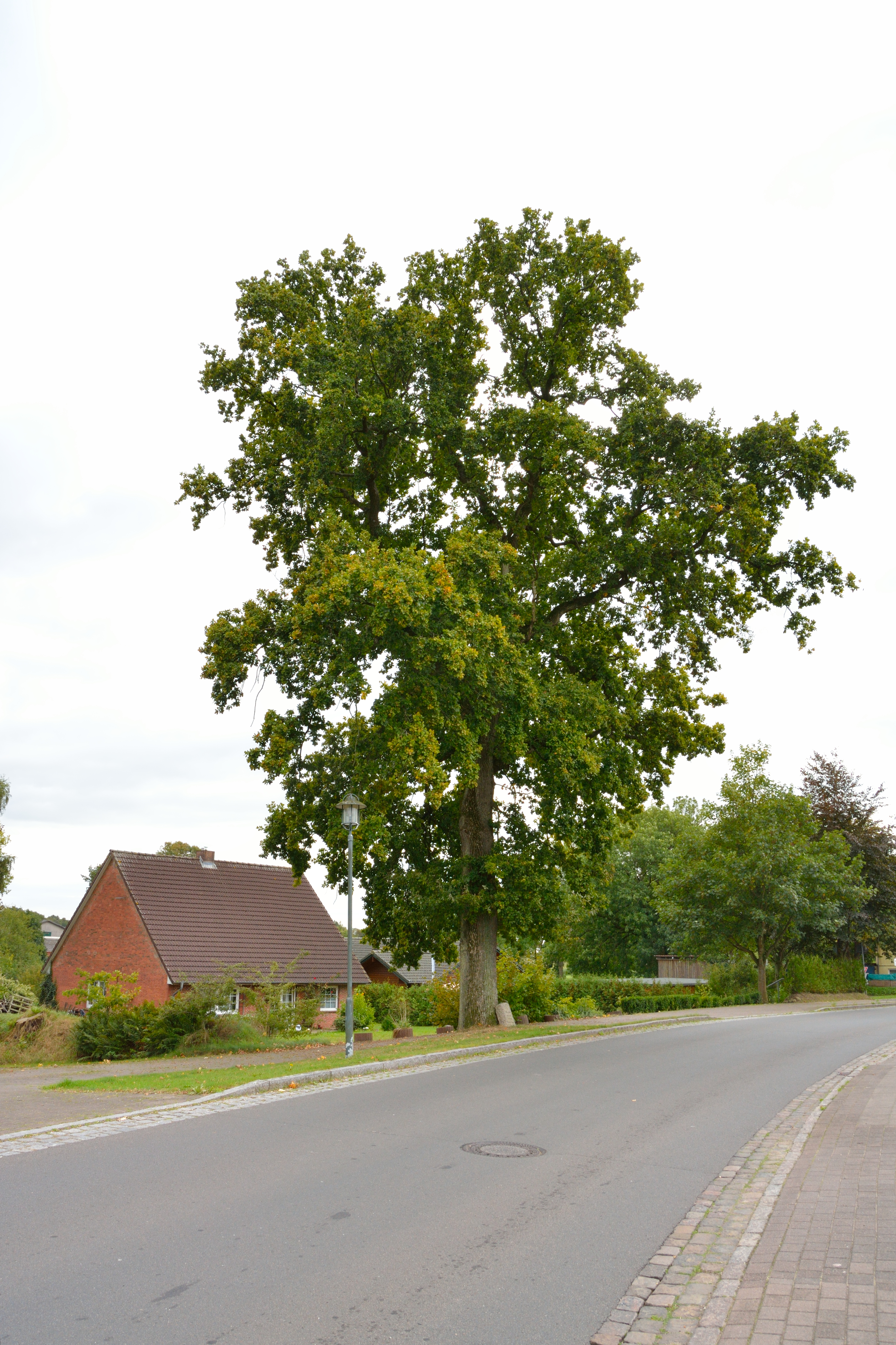 Die Friedenseiche in Besdorf